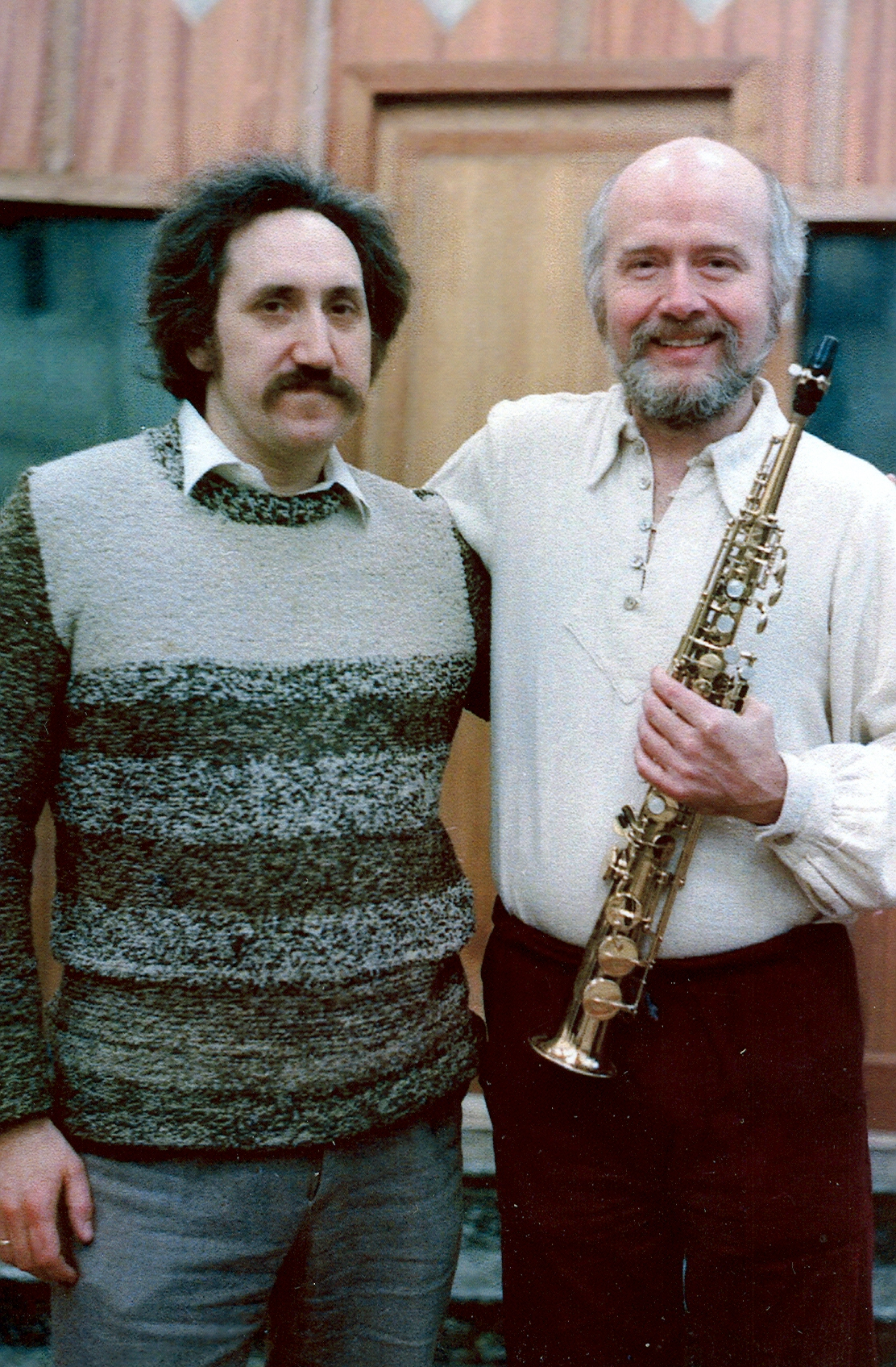 Дмитрий Покровский и Пол Винтер во время гастролей в Америке.